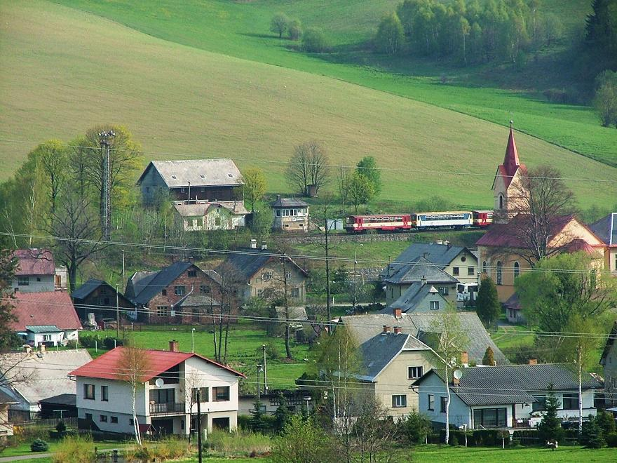 Lichkov (Czechy) - panorama.